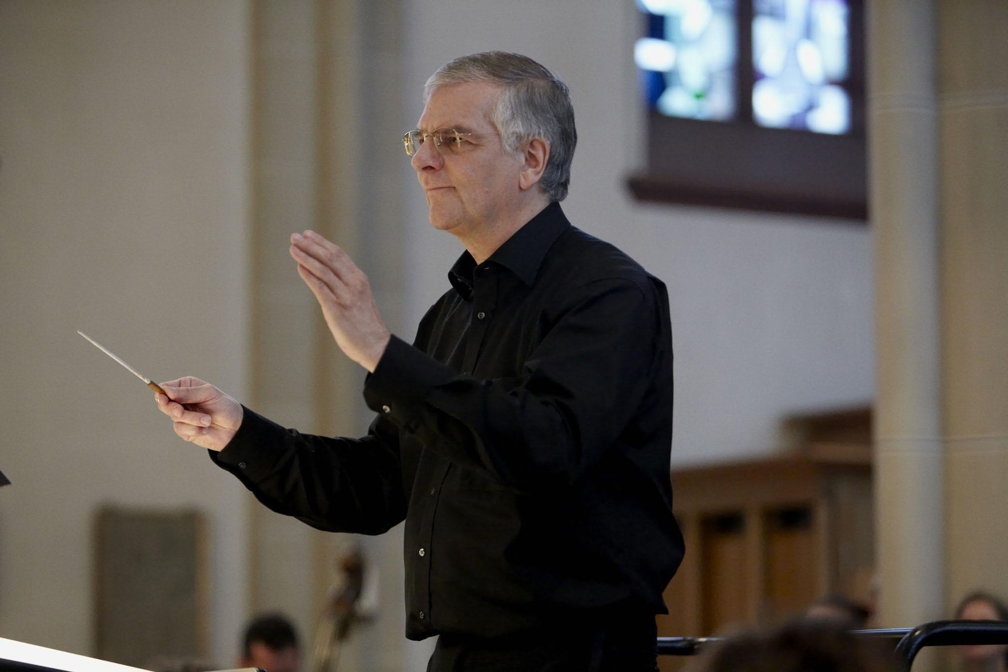 Paukenmesse St. CŠcilia, DŸsseldorf Benrath